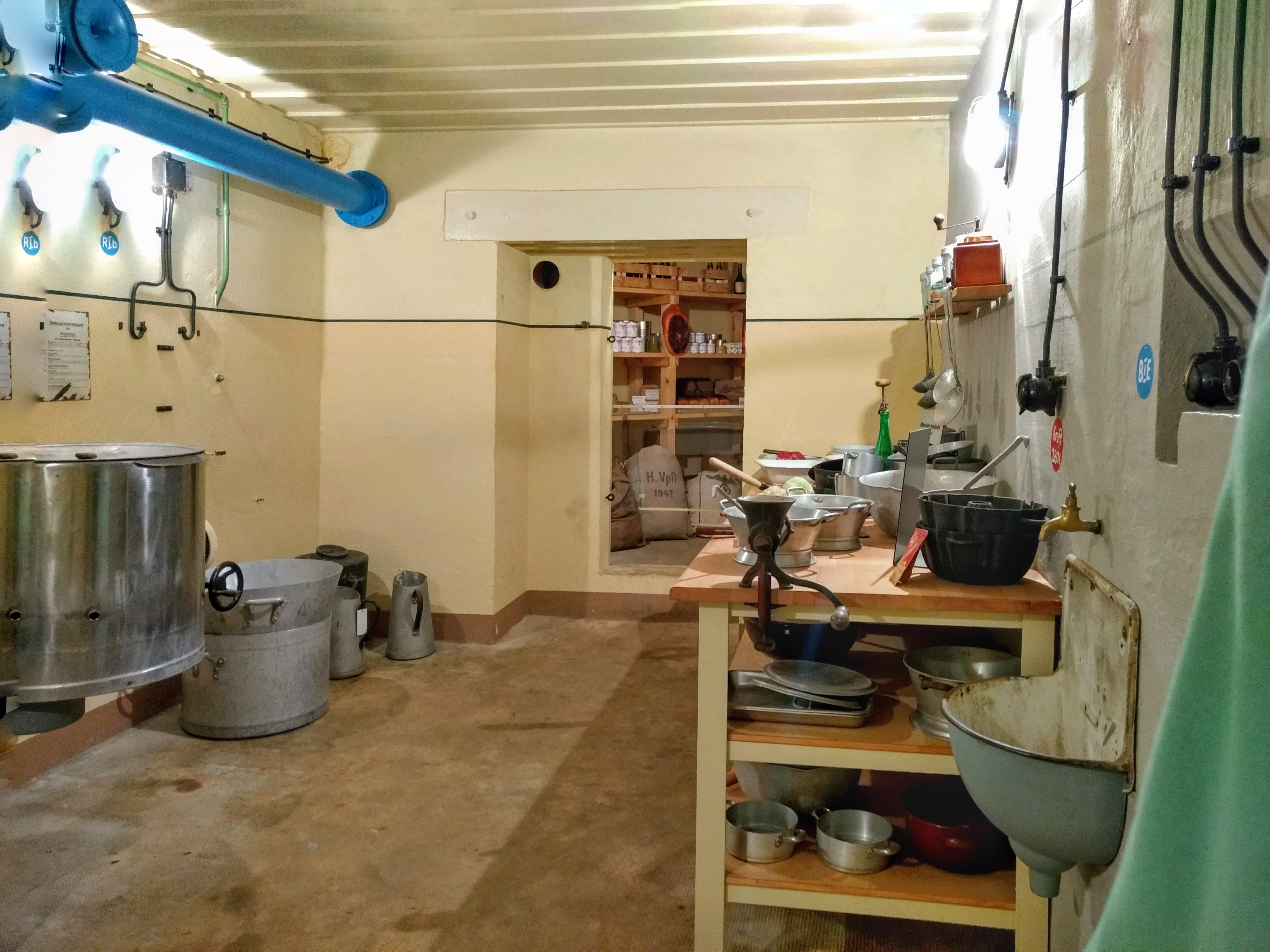 B-Werk Besseringen